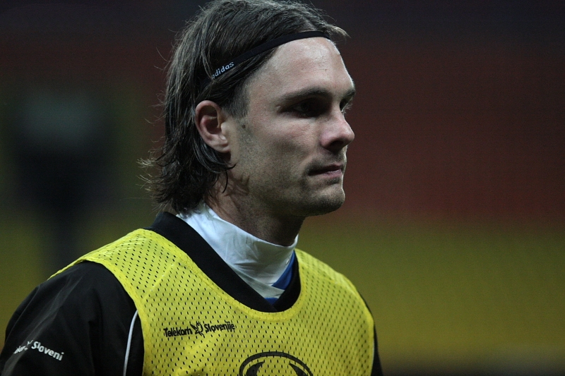 Marko Šuler